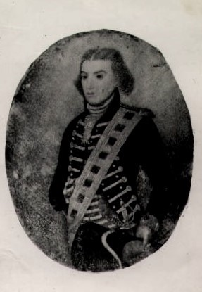 Retrato de Miguel José Félix Belgrano González (1777-1825).